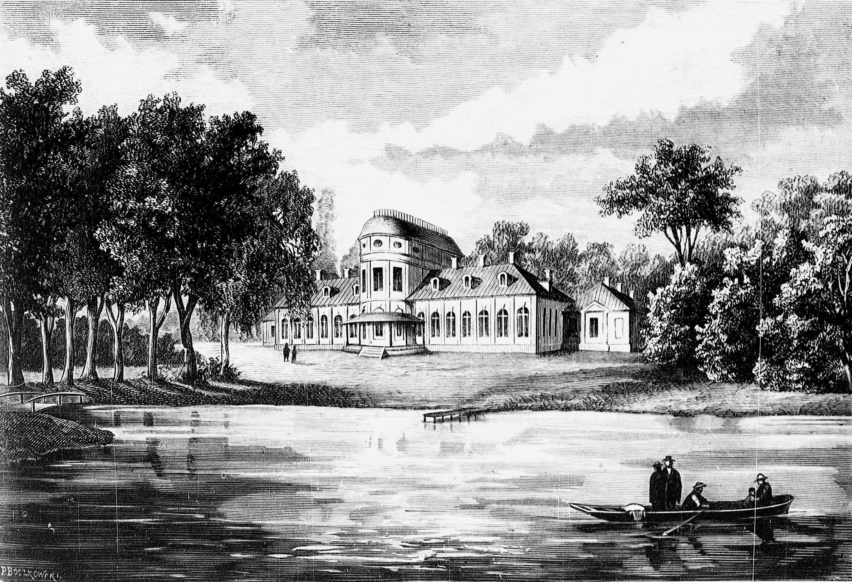 Беларуская (тарашкевіца): Шчорсы (Ščorsy), сядзіба Храптовічаў (Chraptovič)